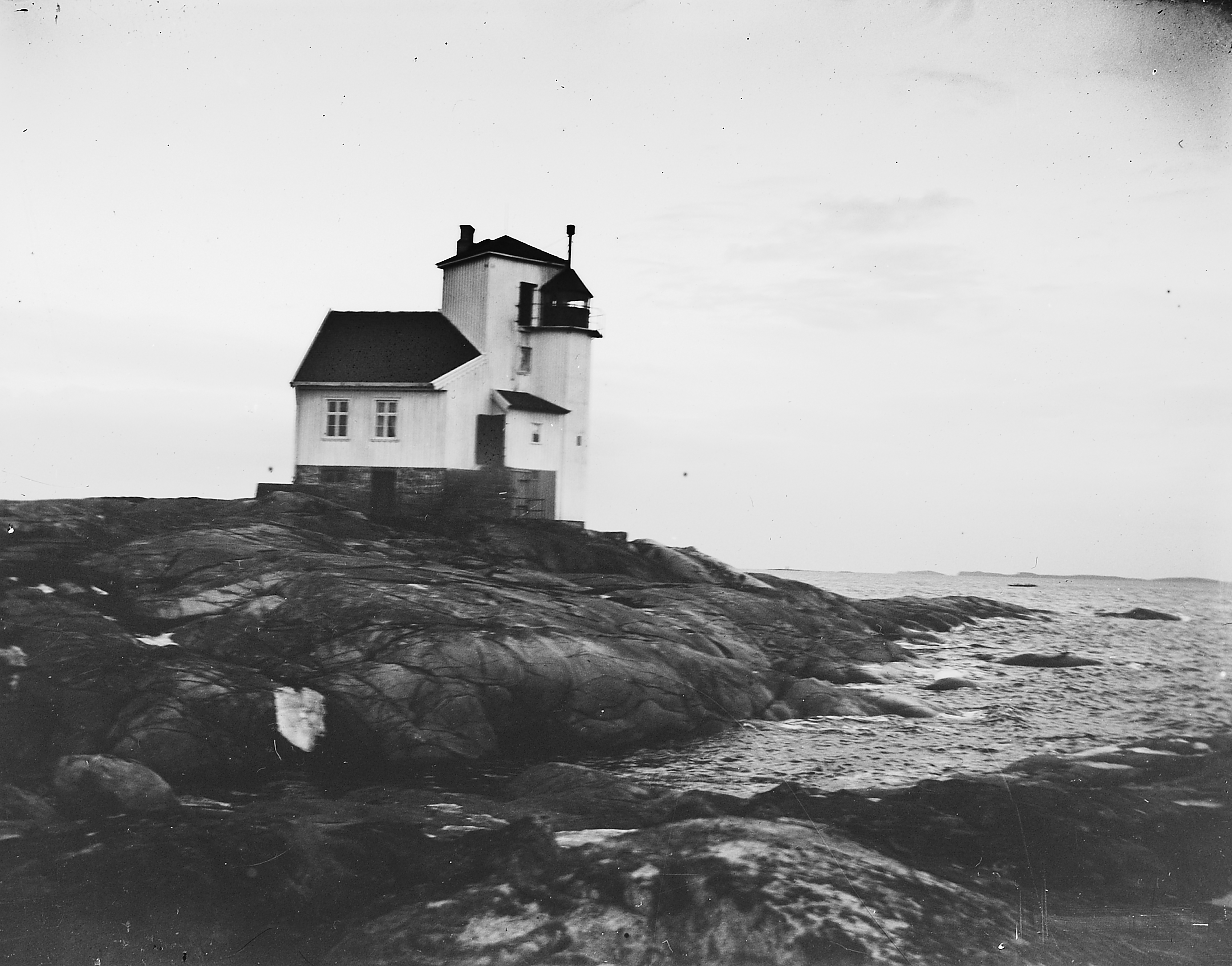 Bildet er hentet fra Arkivverket. Børøyholmen, Hitra Arkivinstitusjon : Riksarkivet Arkivnavn : Fyrdirektoratet Sted : Norge, Sør-Trøndelag, Hitra, Børøyholmen Emneord: Fyr, Kyst Avbildet